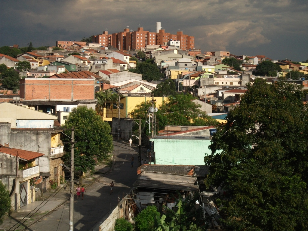 Vista do Jardim Marabá e Vila Carmosina no distrito do Parque do Carmo, na Zona Leste de São Paulo.